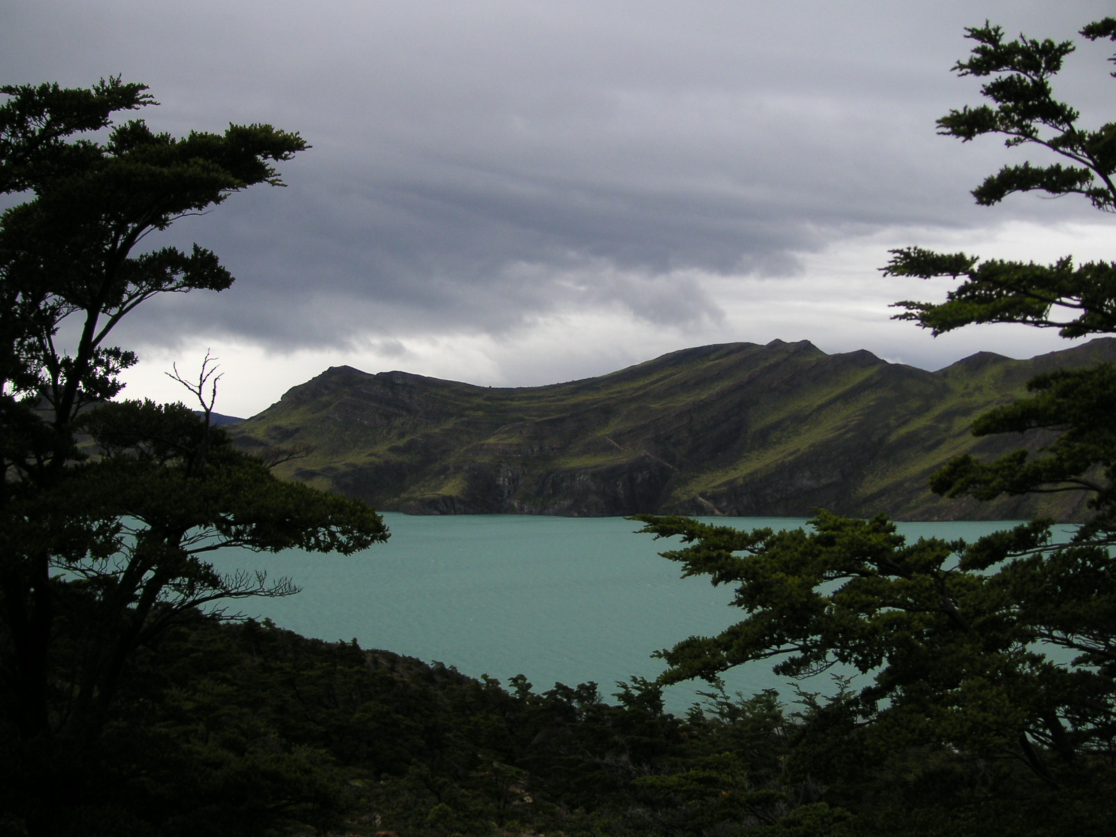 Synclinal perché, Parc national Torres del Paine, Chili.